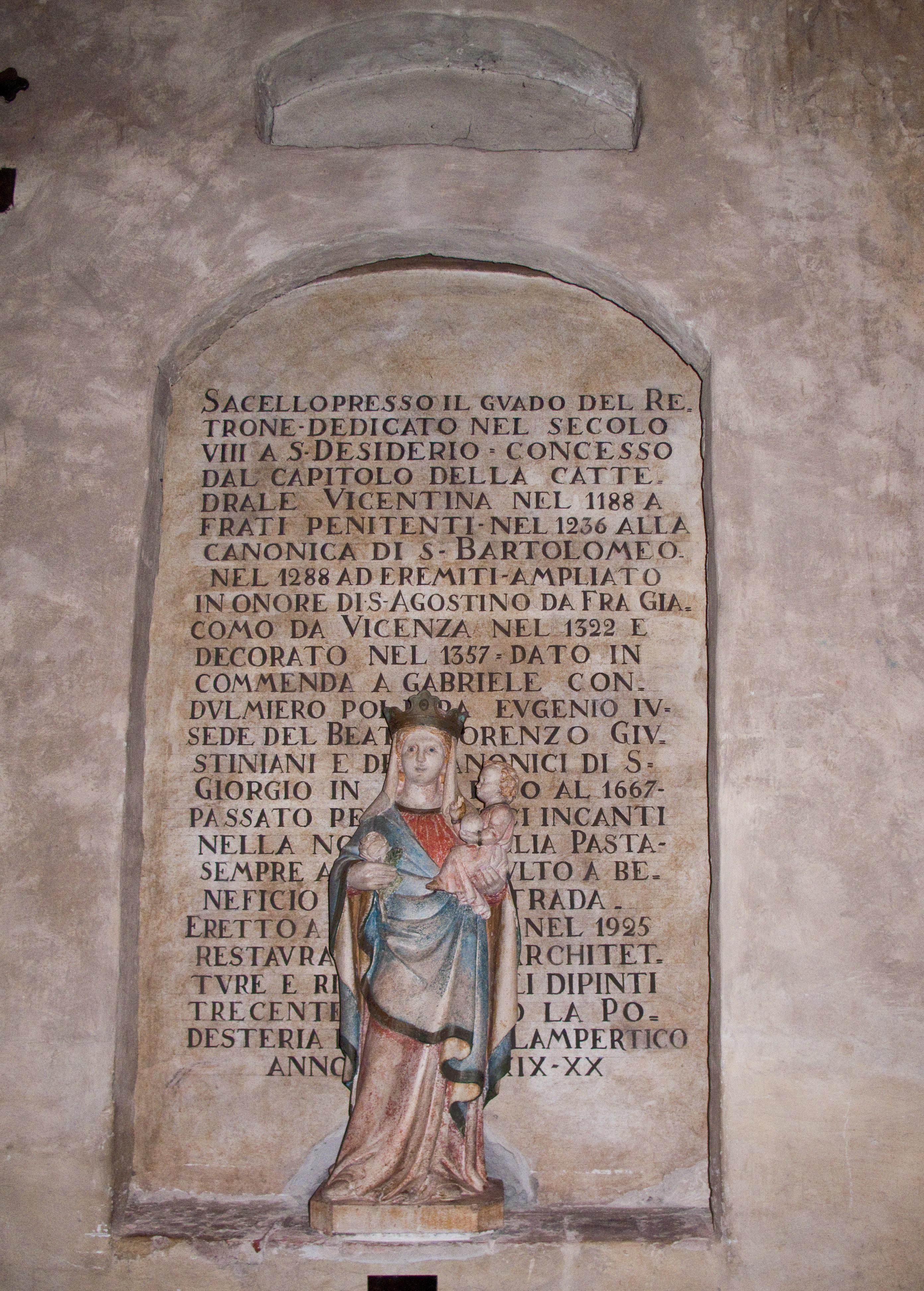 Madonna e lapide